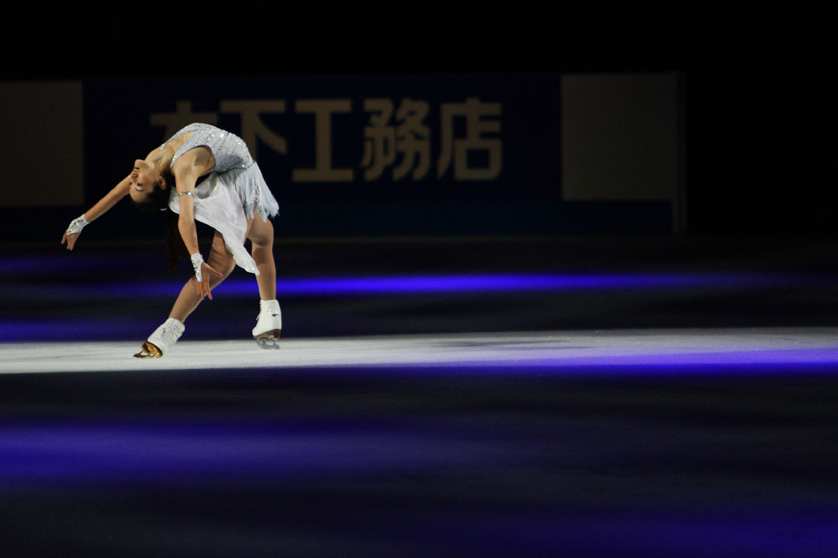 OCTOBER 3, 2009 - Figure Skating : Shizuka Arakawa of Japan during the Japan Open 2009 at Saitama Super Arena on October 3, 2009 in Saitama, Japan. (Photo by Tsutomu Takasu)